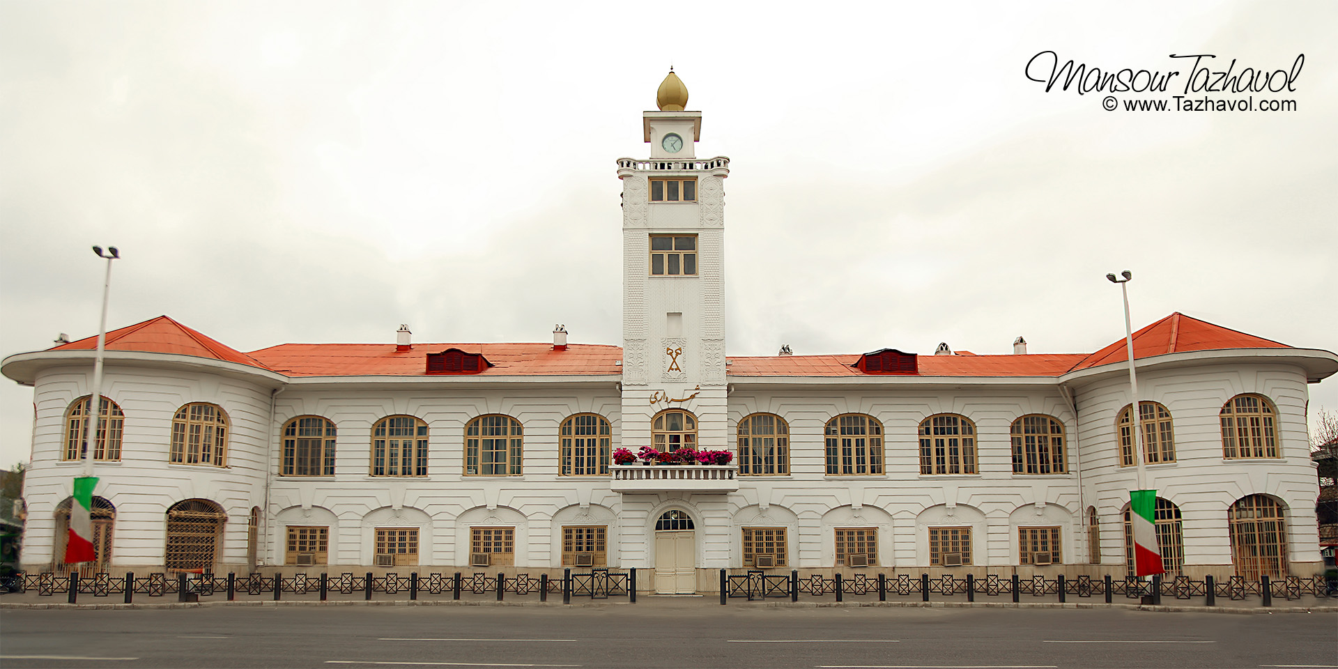 میدان شهرداری رشت ساختمان تاریخیه شهردلری رشت نماد و سمبل رشت